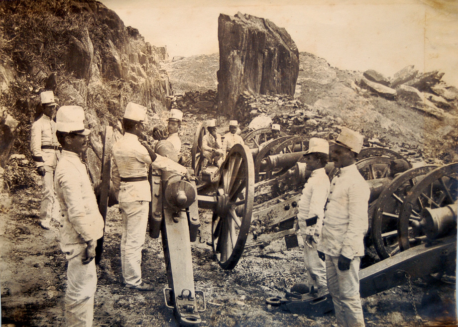 Fotografía de fuerzas de artillería gubernamentales de Uruguay en el marco de la revolución de 1904, ubicadas en las serranías del norte.